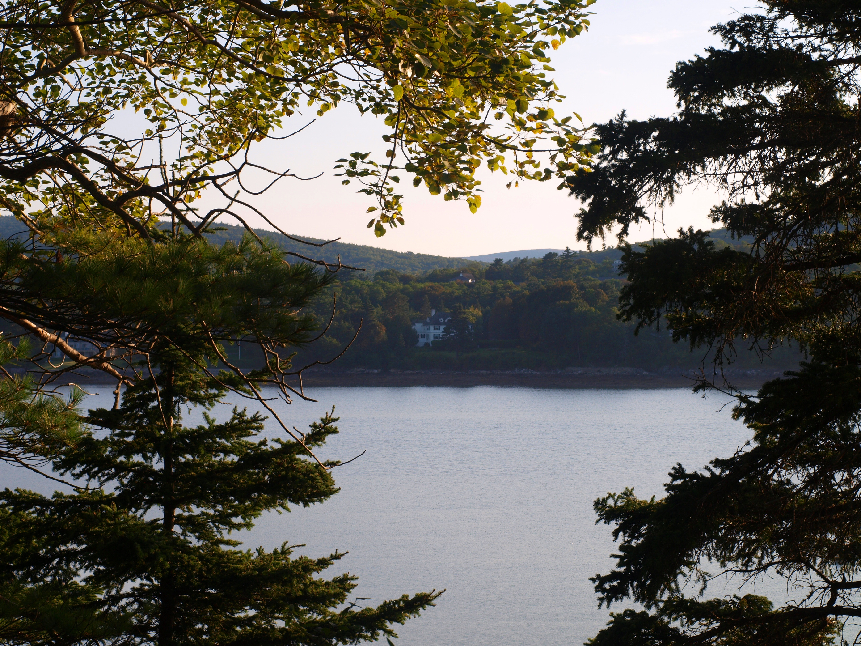 Mount Desert Island, Maine